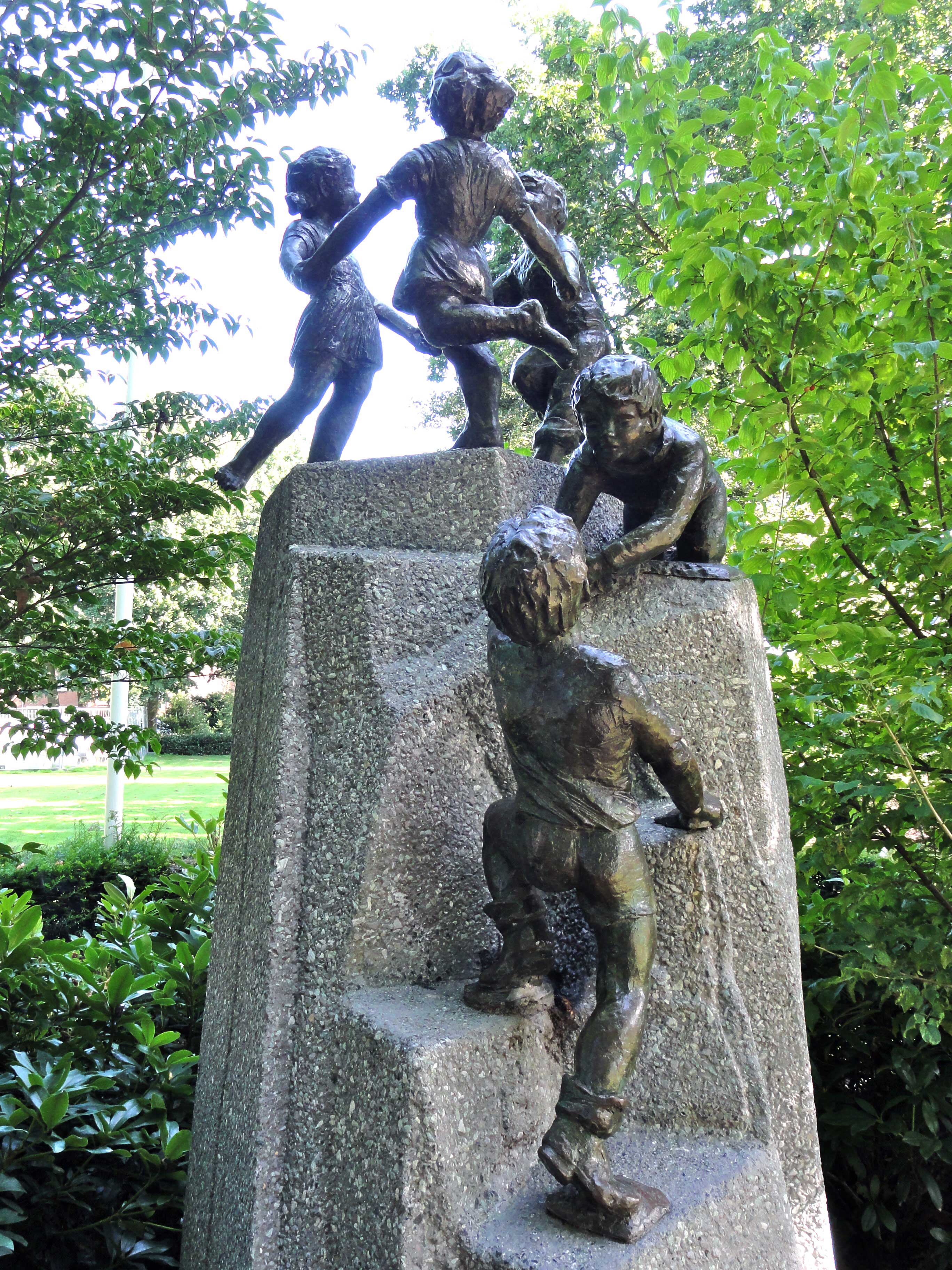 Vrijheidsmonument door Peter Zwart Plantsoen Eemnes